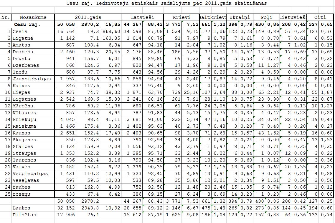 Latvijas 2011.gada tautas skaitīšanas rezultāti.